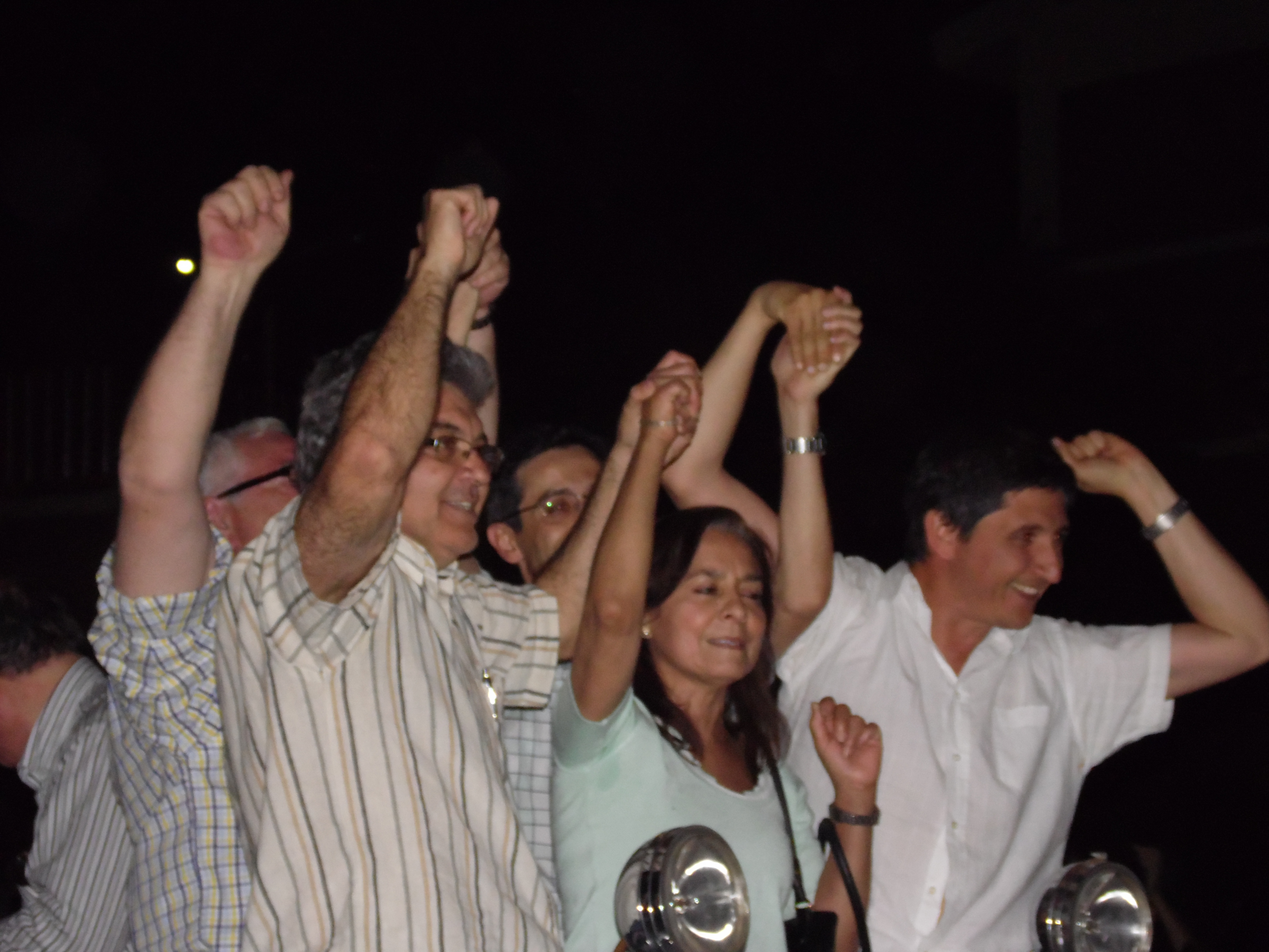 El Rector, Vicerrector y Decanos elegidos por la asamblea de estudiantes auto-convocados.